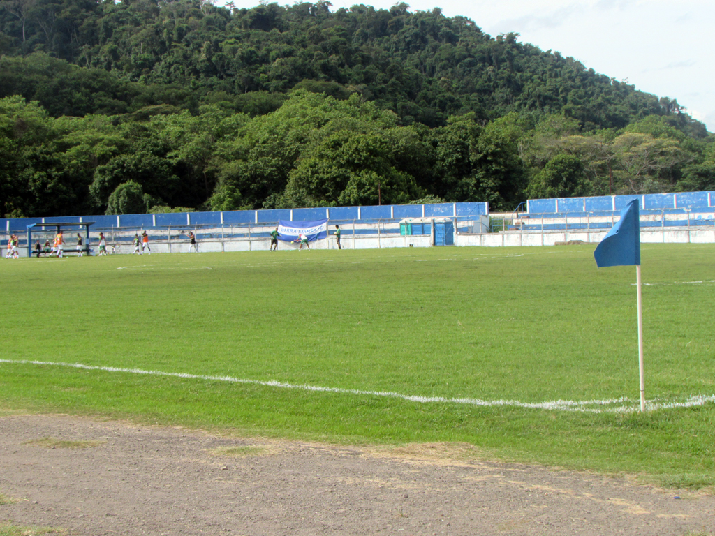 Estádio Leão do Sul